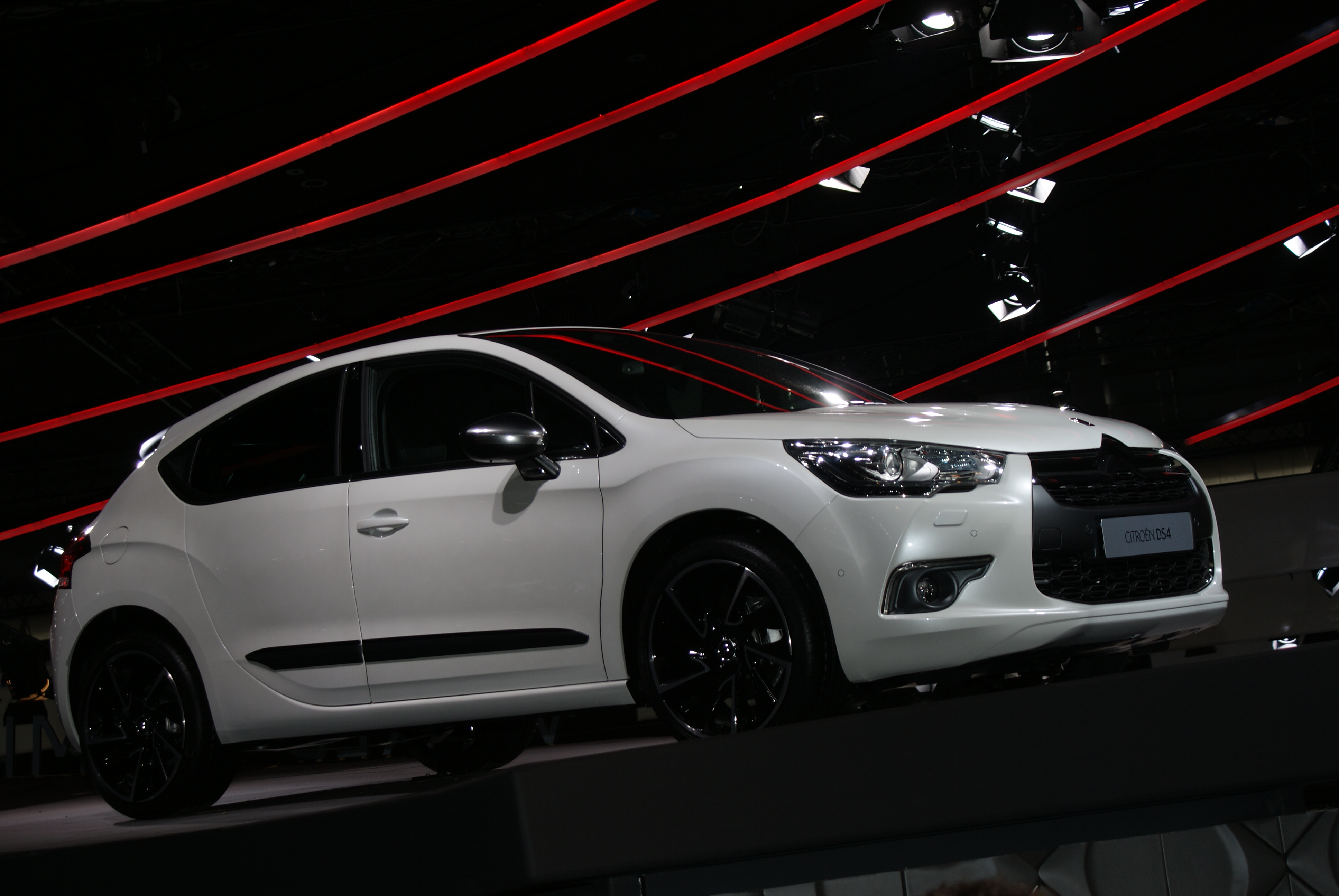 Présentation de la Citroën DS4 au Mondial de l'automobile 2010.